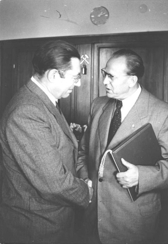 Zentralbild/Igel, 4052-49, 30.9.1949 Fritz Selbmann 50 Jahre Am 29. September 1949 feierte der stellvertr. Vorsitzende der DWK, Fritz Selbmann seinen 50. Geburtstag. Zahlreiche Delegationen waren erschienen, um Fritz Selbmann zu beglückwünschen. UBz: Otto Grotewohl gratuliert Fritz Selbmann im Namen des Zentralsekretariats der SED.